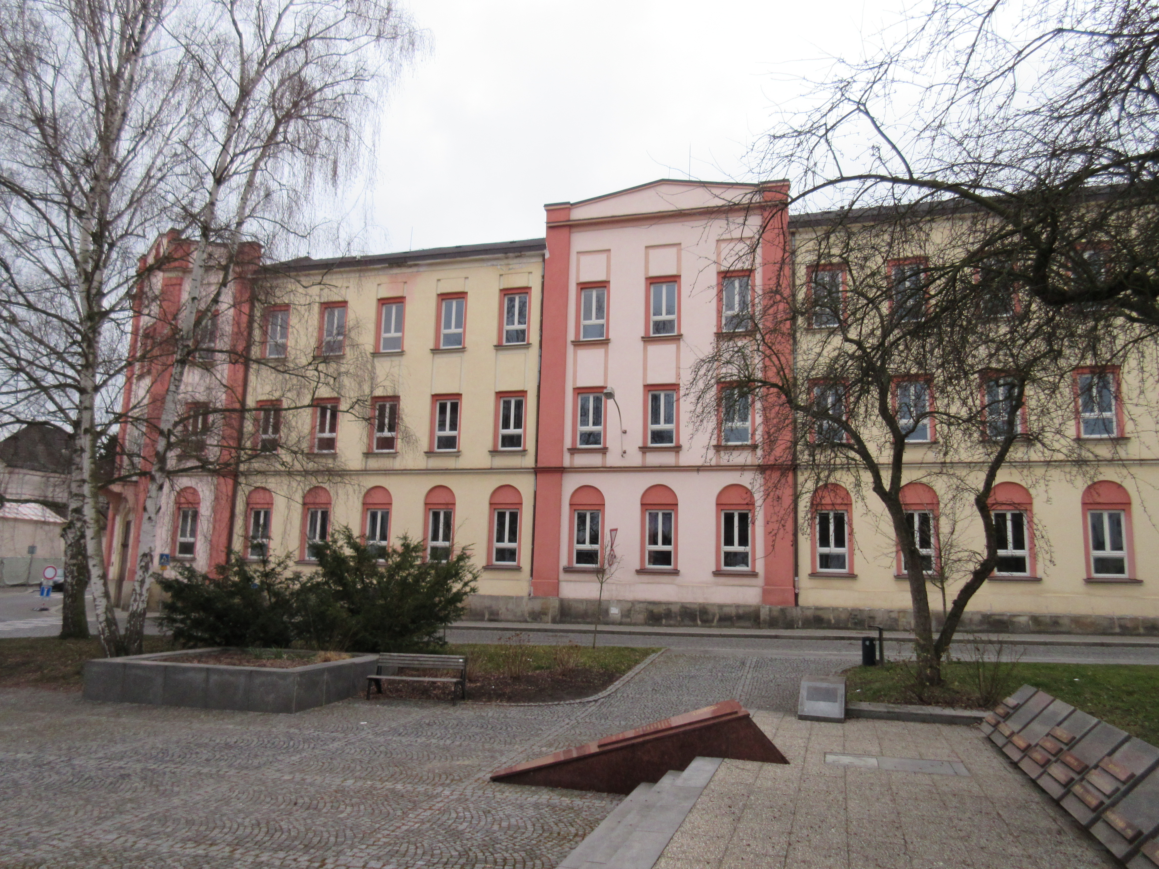 Budova školy od náměstí